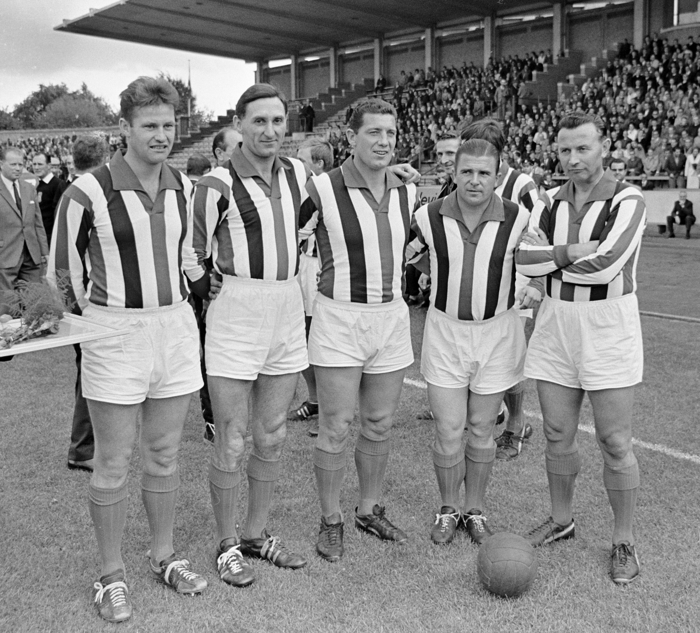 Collectie / Archief : Fotocollectie Anefo Reportage / Serie : [ onbekend ] Beschrijving : Jubileumwedstrijd op Willem II terrein Tilburg, v.l.n.r Kuys, Wilkes, Van der Hart , Puskas, Lenstra Datum : 15 augustus 1966 Locatie : Noord-Brabant, Tilburg Trefwoorden : sport, voetbal Persoonsnaam : Lenstra, Abe, Puskas, Ferenc, Wilkes, Faas Fotograaf : Nijs, Jac. de / Anefo Auteursrechthebbende : Nationaal Archief Materiaalsoort : Negatief (zwart/wit) Nummer archiefinventaris : bekijk toegang 2.24.01.05 Bestanddeelnummer : 919-4508